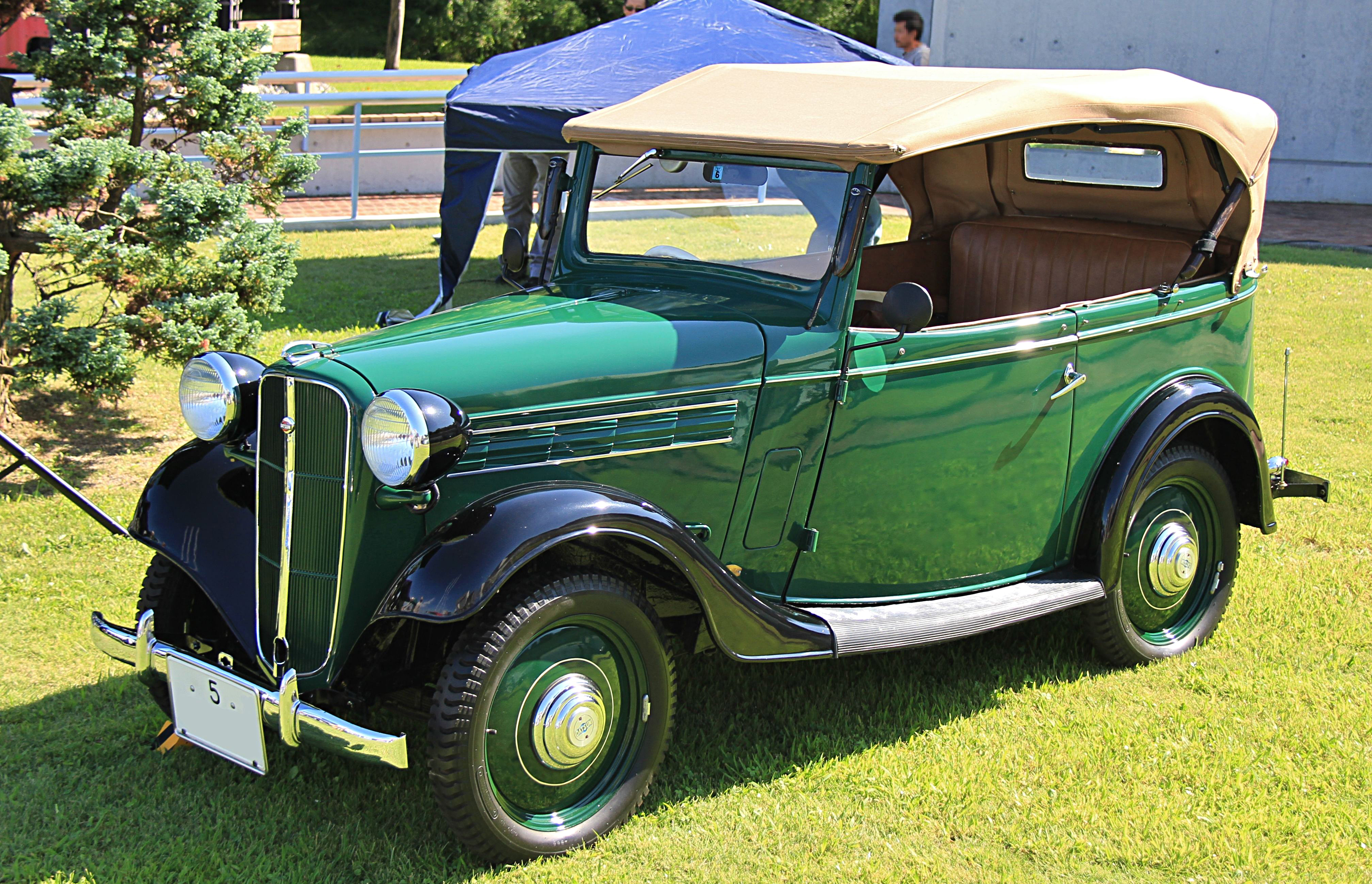 Datsun Model 17